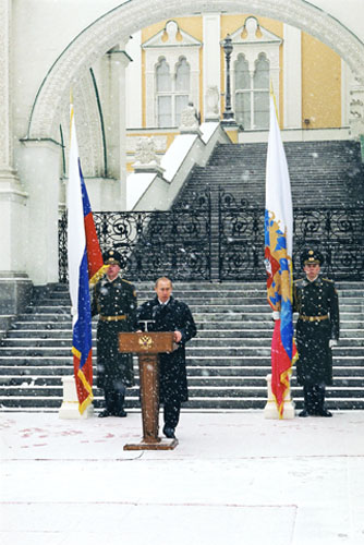 МОСКВА, КРЕМЛЬ, СОБОРНАЯ ПЛОЩАДЬ. Выступление на церемонии вручения знамен видов Вооруженных Сил России и других войск.